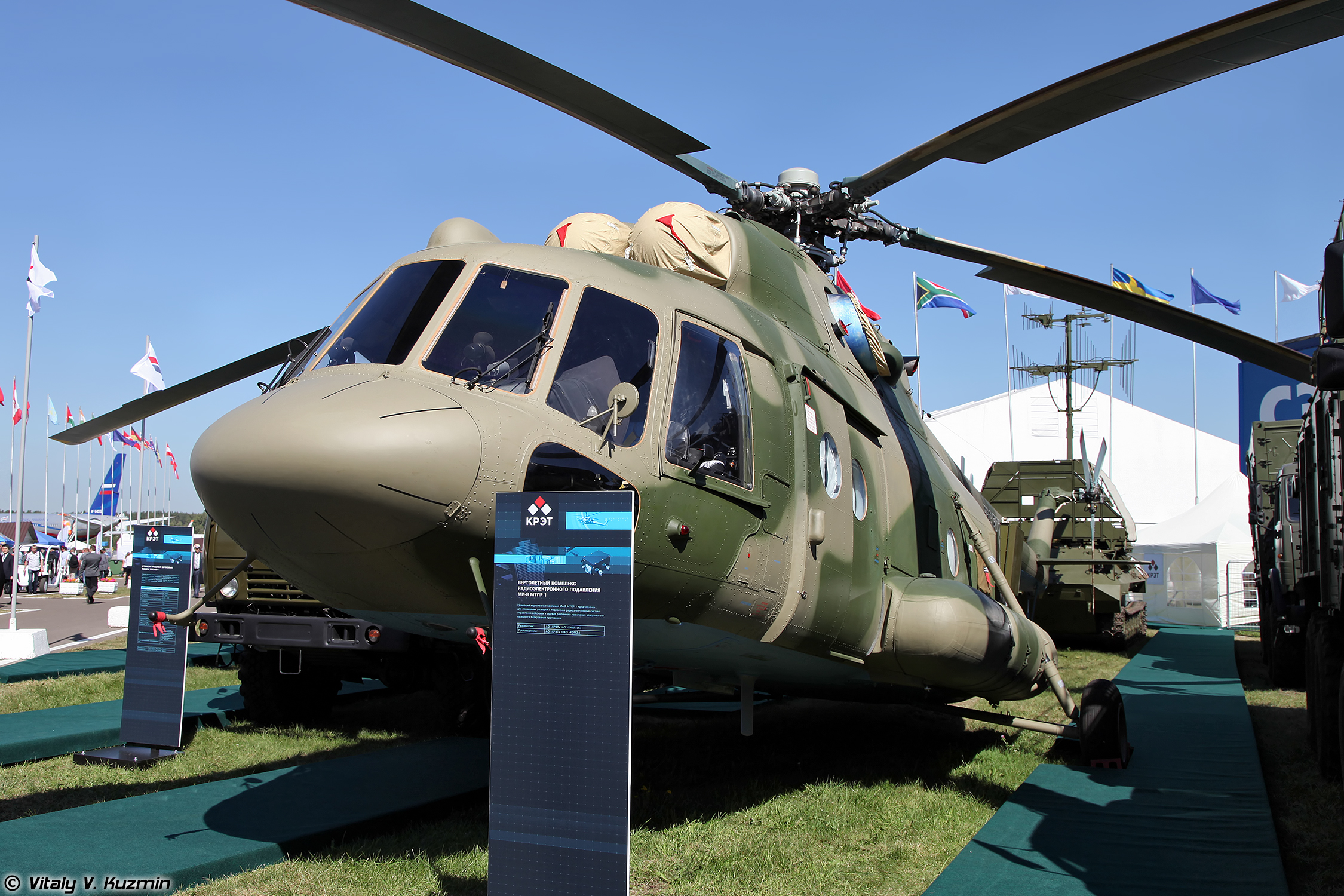 Вертолетный комплекс радиоэлектронного подавления Ми-8МТПР-1 (Mi-8MTPR-1 EW helicopter)